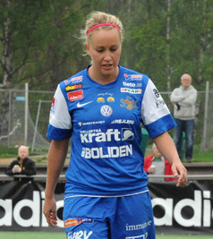 a_74_4064